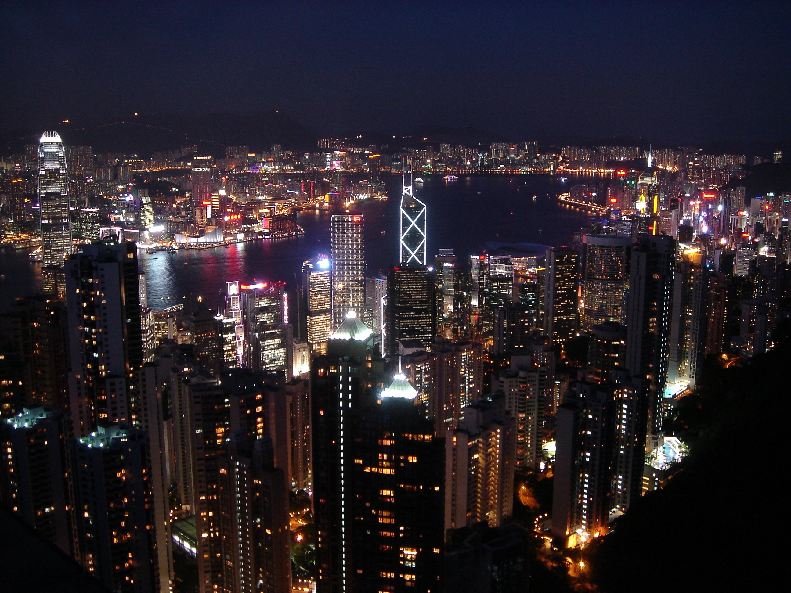 Blick vom Victoria Peak über Central bei Nacht